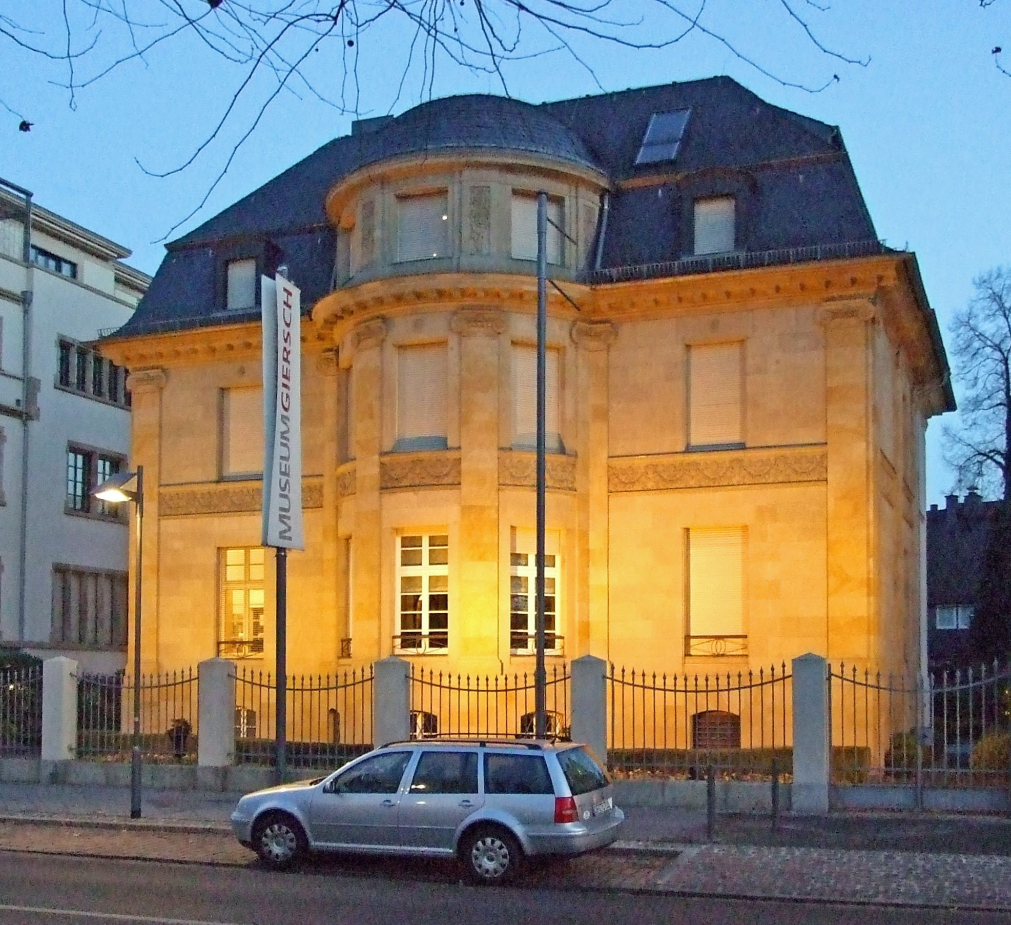 Die Galerie "Museum Giersch" in Frankfurt am Main. Die spätklassizistische Villa Holzmann am Schaumainkai 83 wurde um 1910 für die Unternehmerfamilie Holzmann errichtet. Die Villa hatte 1997 die Stadt Frankfurt für den vergleichsweise günstigen Preis von etwa 1,5 Millionen Mark an die Frankfurter Unternehmer und Senatoren E. h. Karin Giersch und Professor Carlo Giersch (Spoerle Electronic + UNIELEKTRO) verkauft, der dann gut sieben Millionen Mark in Sanierung und Umbau des Gebäudes steckte, in dem das von ihm finanzierte und seinen Namen tragende Museum untergebracht wurde. Allerdings sieht ein Eintrag im Grundbuch vor, dass die ausschließliche Nutzung des Gebäudes für kulturelle Zwecke vorschreibt.